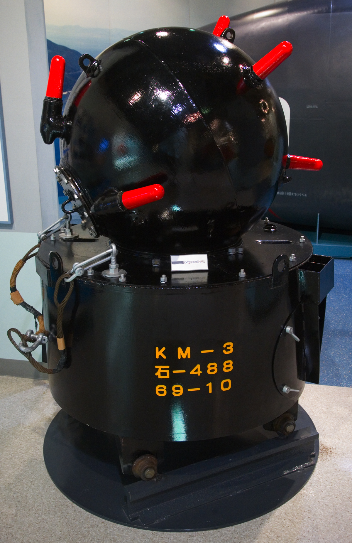 A Japanese K-13 (or K-3) sea mine (or naval mine) at Kanoya museum.